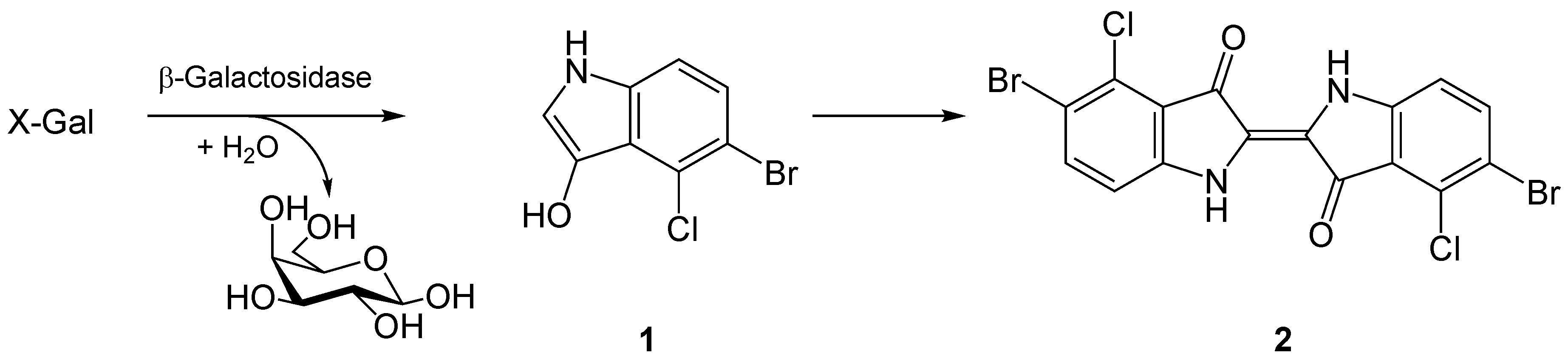 Enzymatische Hydroylse X-Gals